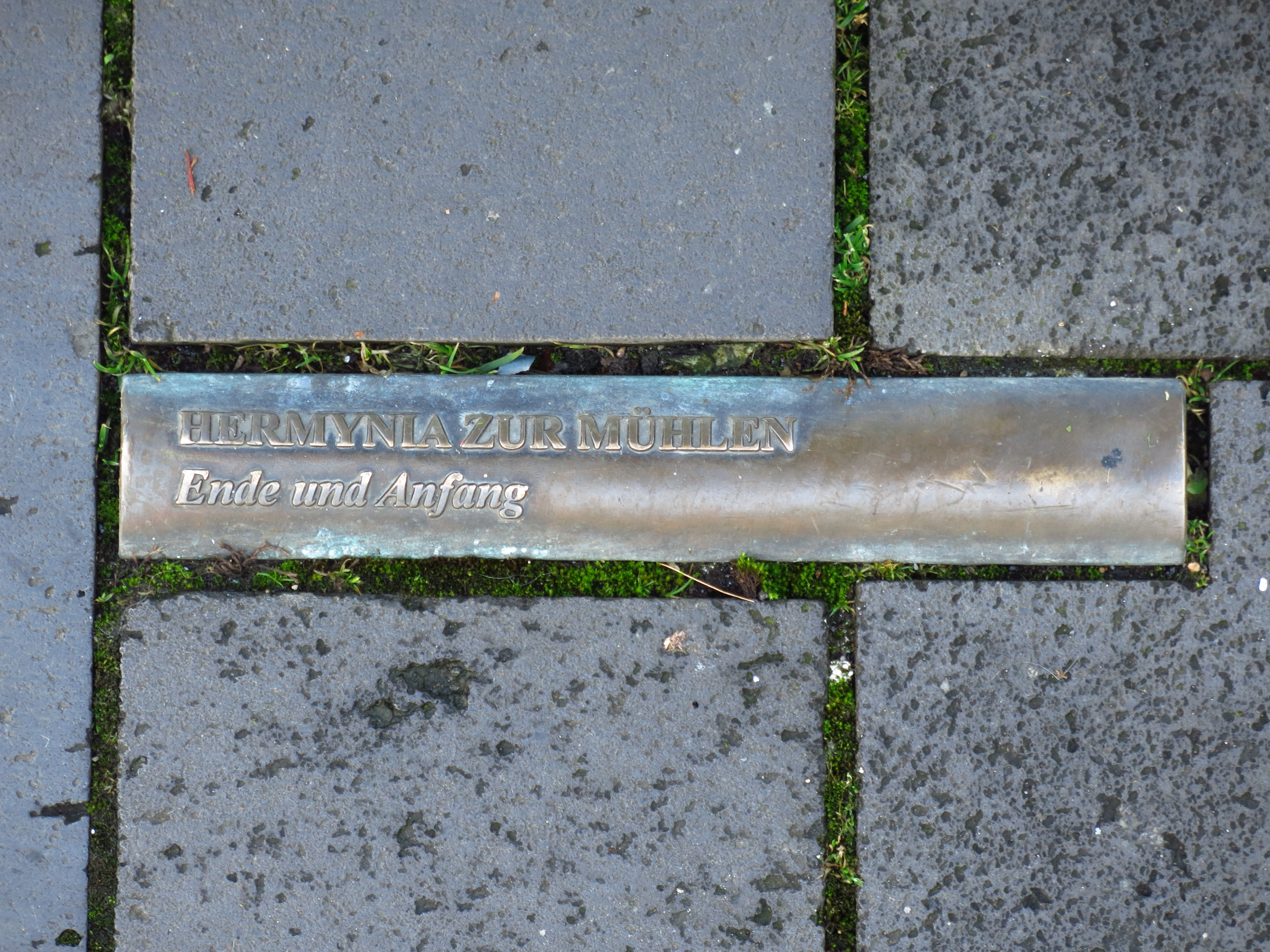 Das Mahnmal zur Bücherverbrennung auf dem Bonner Markt; In das Pflaster des Bonner Markt sind insgesamt 60 sichtbare Buchrücken, sogenannte „Lesezeichen“, verteilt, die sich an der Rathaustreppe, dem Ort an dem die Bücher am 10. Mai 1933 verbrannt wurden, verdichten. Zusätzlich wurde ein wetterfester Archiv-Behälter in Form einer Büchertruhe in den Platz eingelassen. Seine Inschrift benennt das Ereignis und weitere Autoren von verbrannten Büchern.